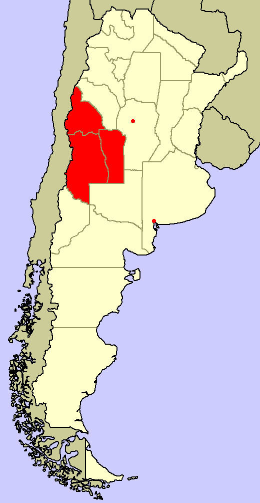 Situación de la revolución libertadora al 20 de septiembre de 1955. Mapa original: Argentina provinces, blank.png